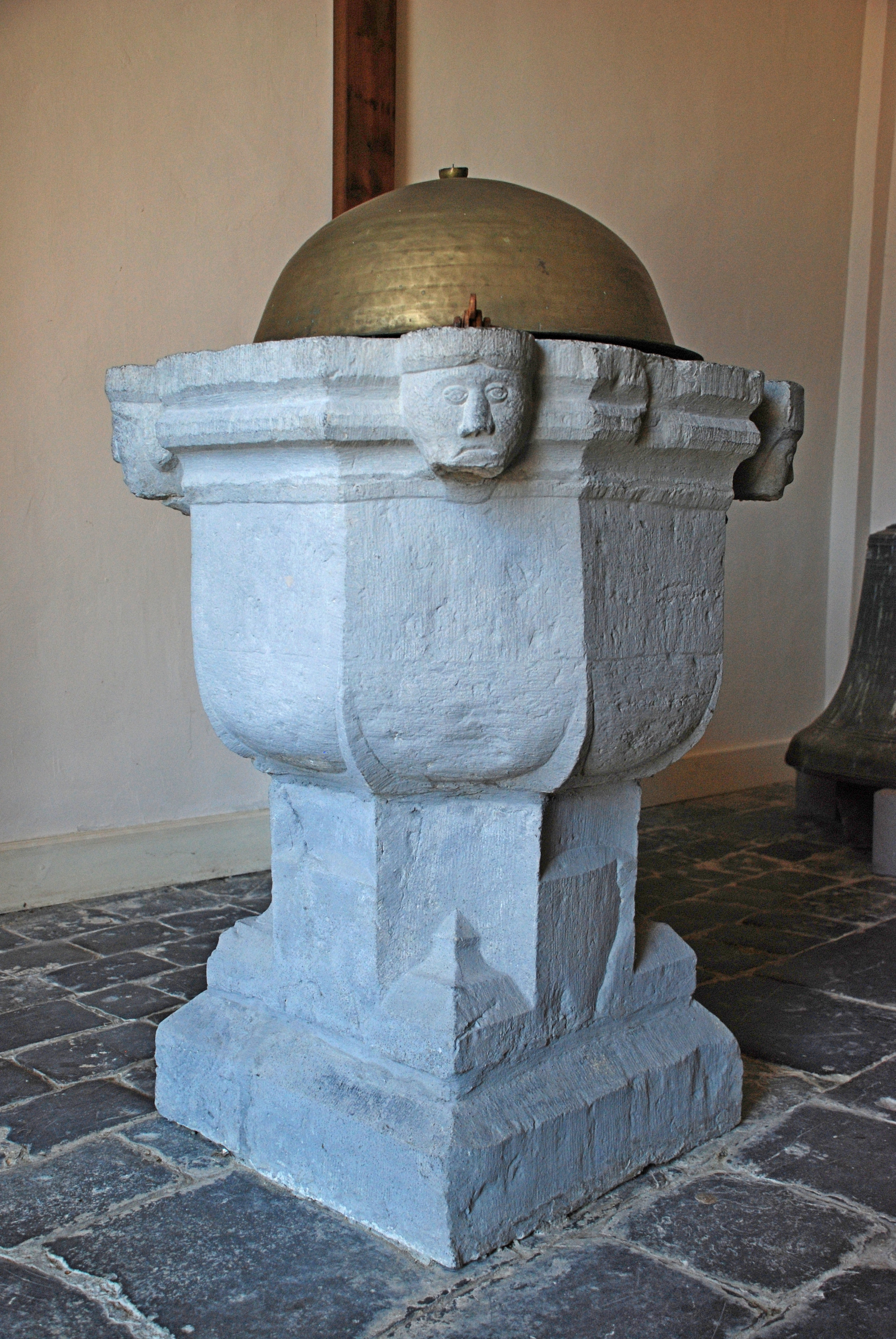 Belgique - Wallonie - Église Saint-Remacle d'Ocquier - Fonts baptismaux